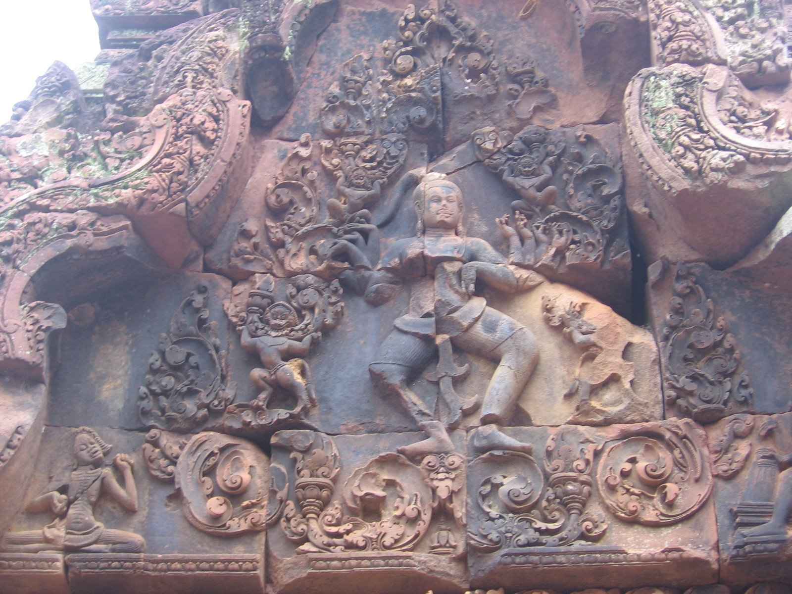 濕婆神大跳破壞之舞